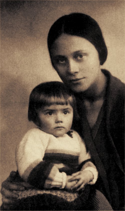 Helena Zan-Stankiewicz (1904-1996) and Maria Stankiewicz (1927-1940)